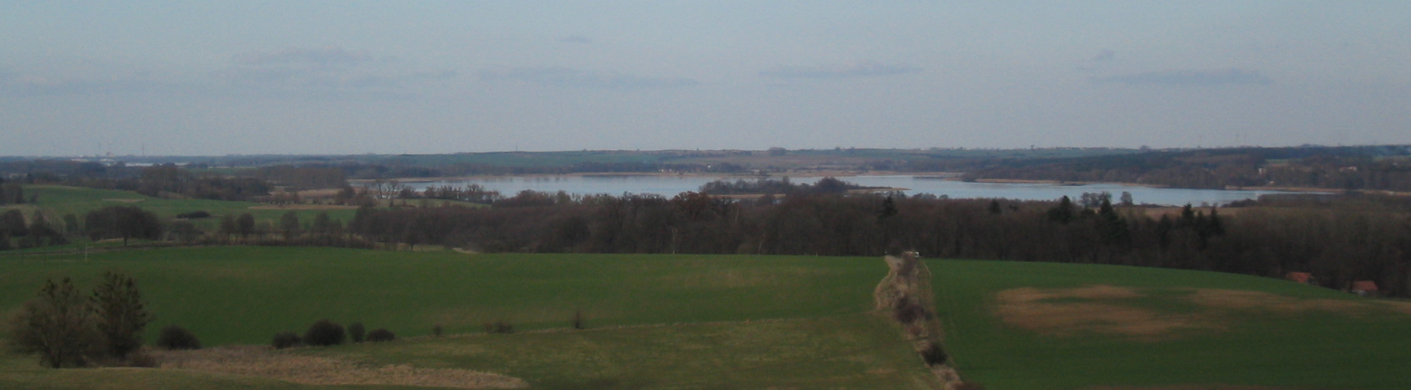 Oberuckersee in der Uckermark mit Burgwallinsel. Im Hintergrund (links) der Unteruckersee mit Stadt Prenzlau. Blick vom Pechberg (Vossberg).